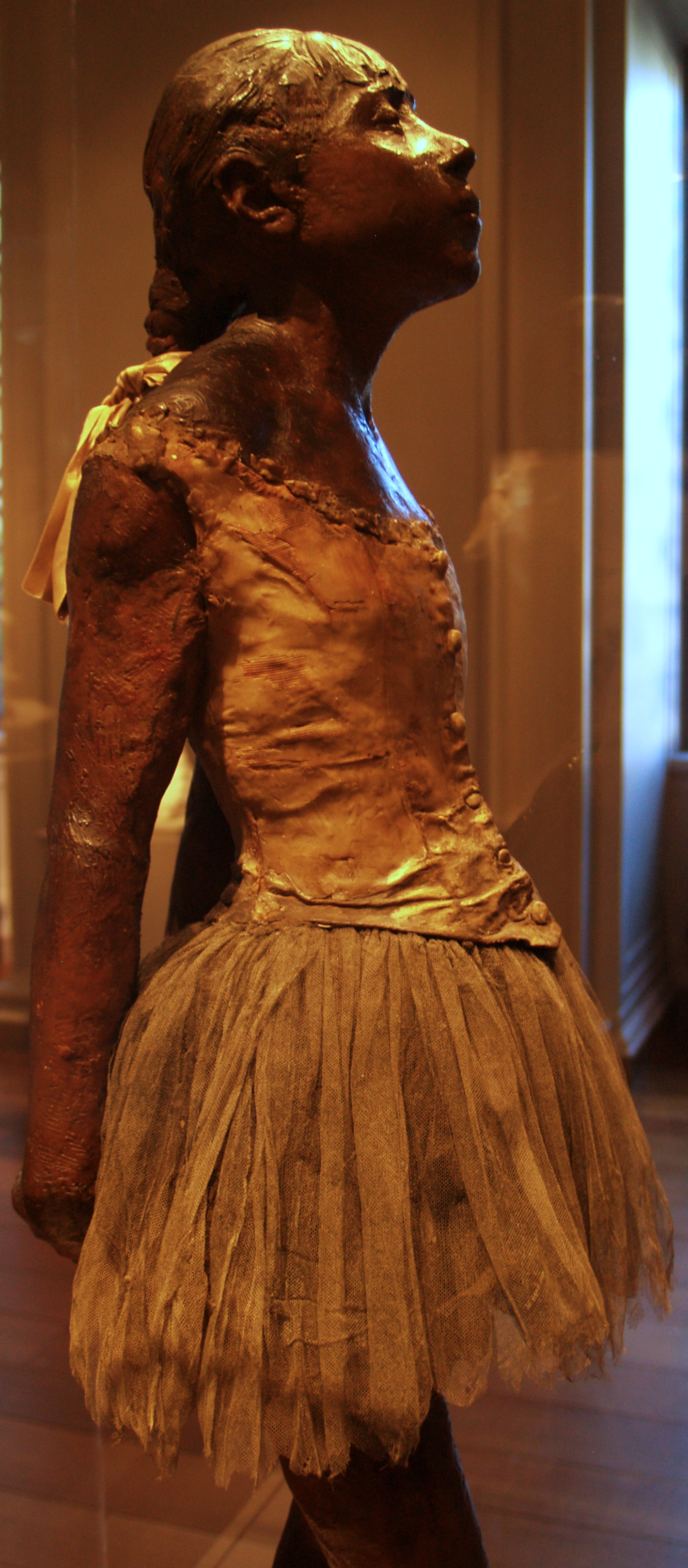 Washington, National Gallery of Art. Bailarina, por Degas.